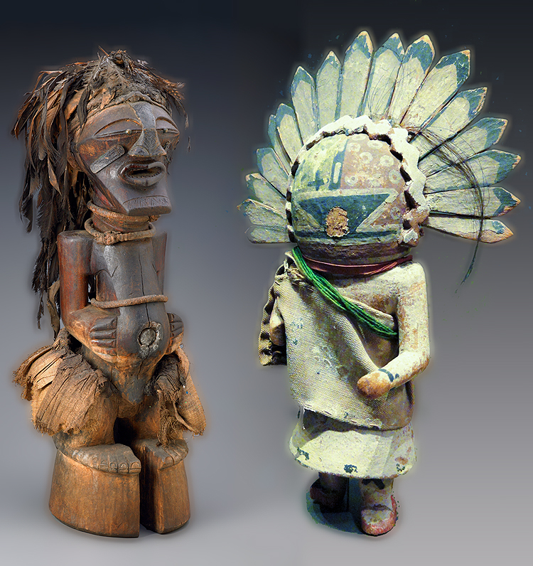 Collage: Gegenüberstellung einer Songye Power-Figur und einer Hopi-Kachina